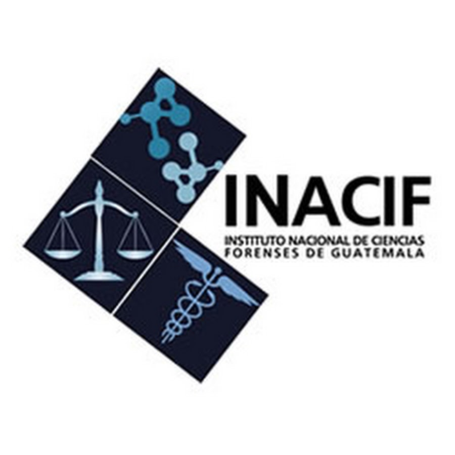 Logo del Instituto Nacional de CIencias Forenses de Guatemala